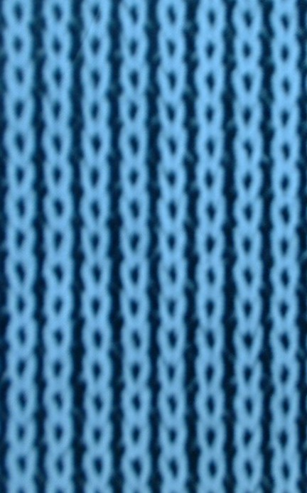 Rechte Seite der Kettenwirkware Charmeuse